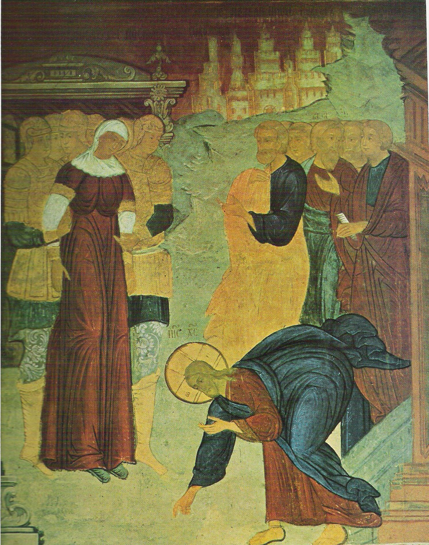 Христос и грешница. Фреска Софийский собор в Вологде